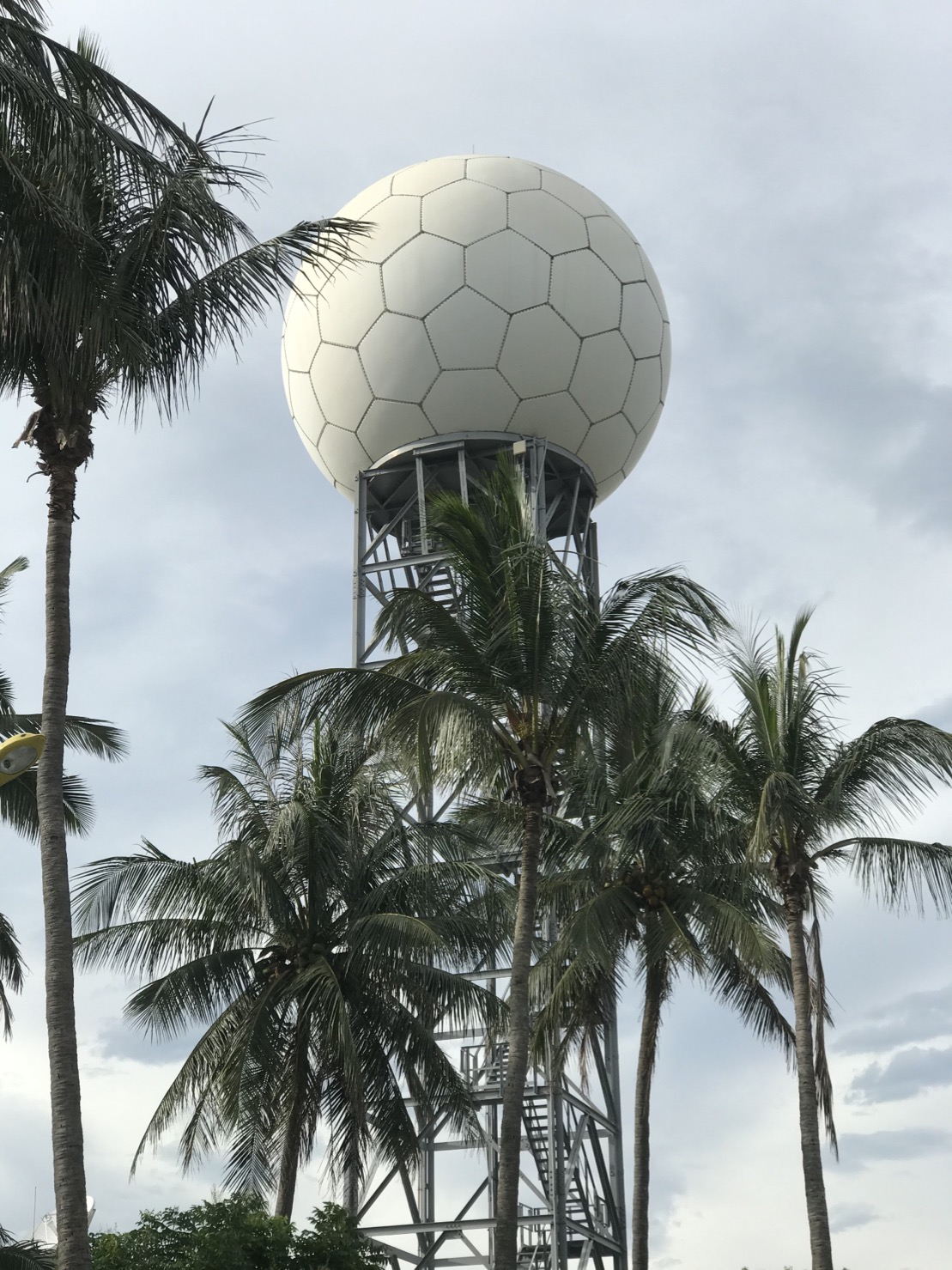 中文（台灣）: 交通部中央氣象局花蓮氣象雷達站第三代雷達塔